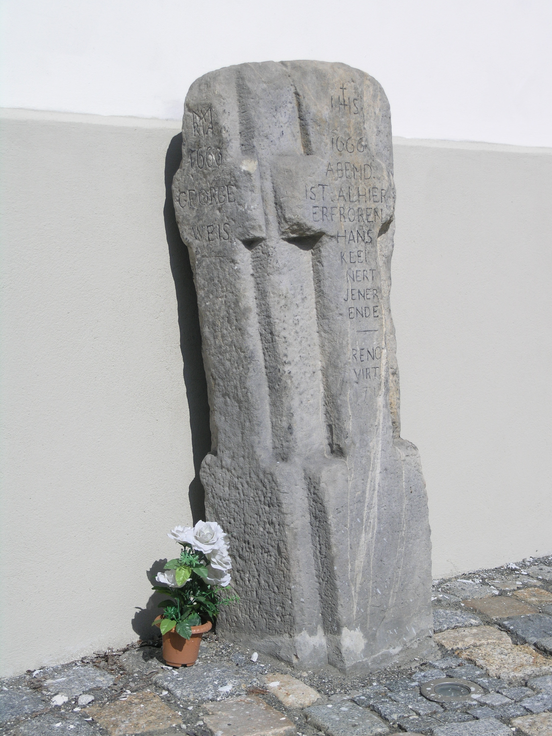 Česká republika, Jablonec nad Nisou - křížový kámen u kostela svaté Anny